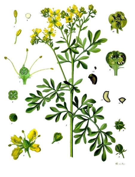 Gartenraute. A blühender Stengel in natürl. Grösse; 1 Blüthenknospe, vergrössert; 2 vierzählige Blüthe, desgl.; 3 Staubgefäss, desgl.; 4 Pollen, desgl.; 5 Stempel im Längsschnitt, desgl.; 6 Fruchtknoten im Querschnitt, desgl.; 7 Fruchtknoten von oben, desgl.; 8 u. 9 Frucht in natürl. Grösse; 10 dieselbe, vergrössert; 11 dieselbe im Längsschnitt, desgl.; 12 Same, natürl. Grösse und vergrössert; 13 derselbe im Längsschnitt, vergrössert; 14 derselbe im Querschnitt, desgl.